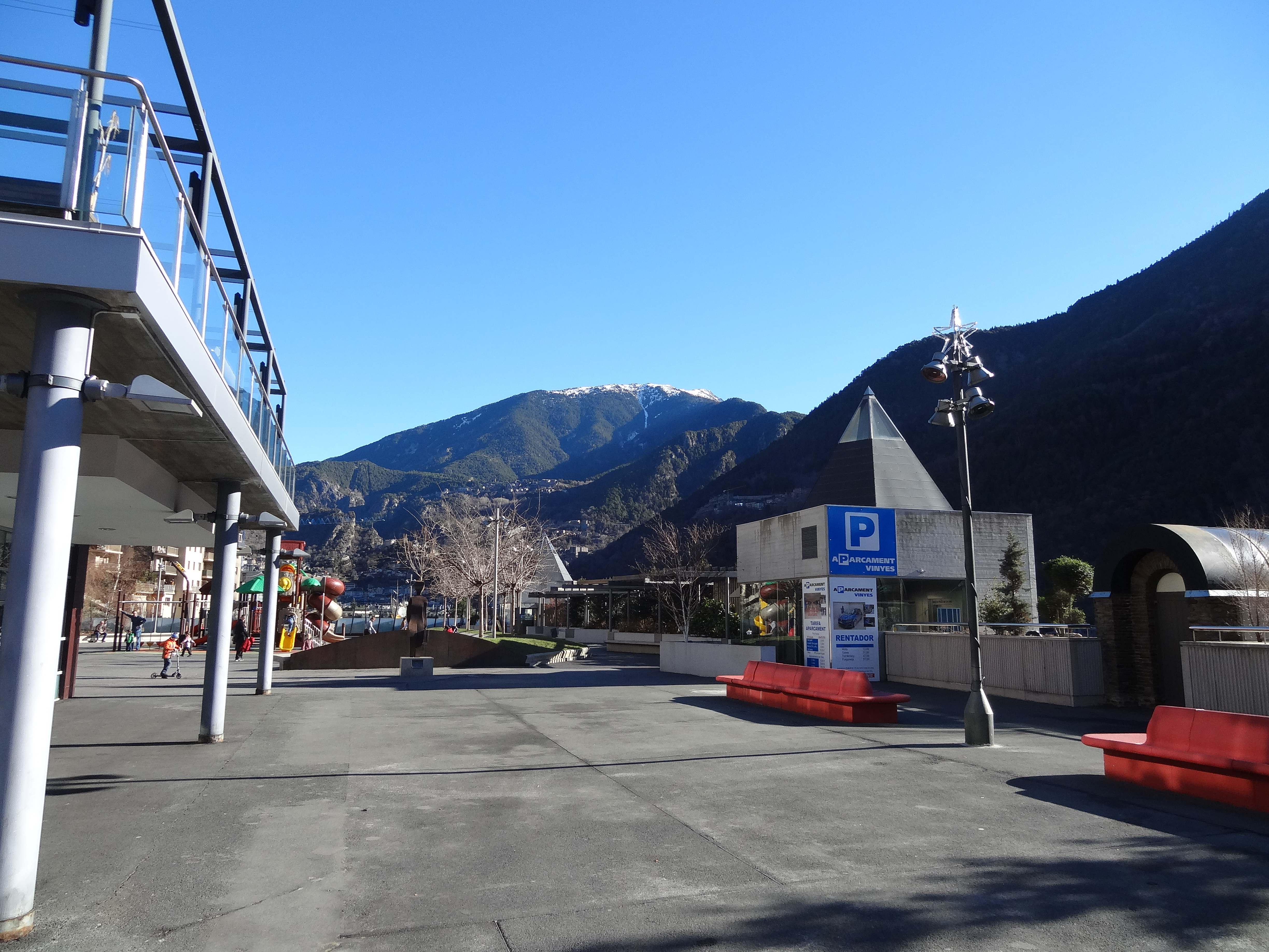 Place du Peuple, Andorre